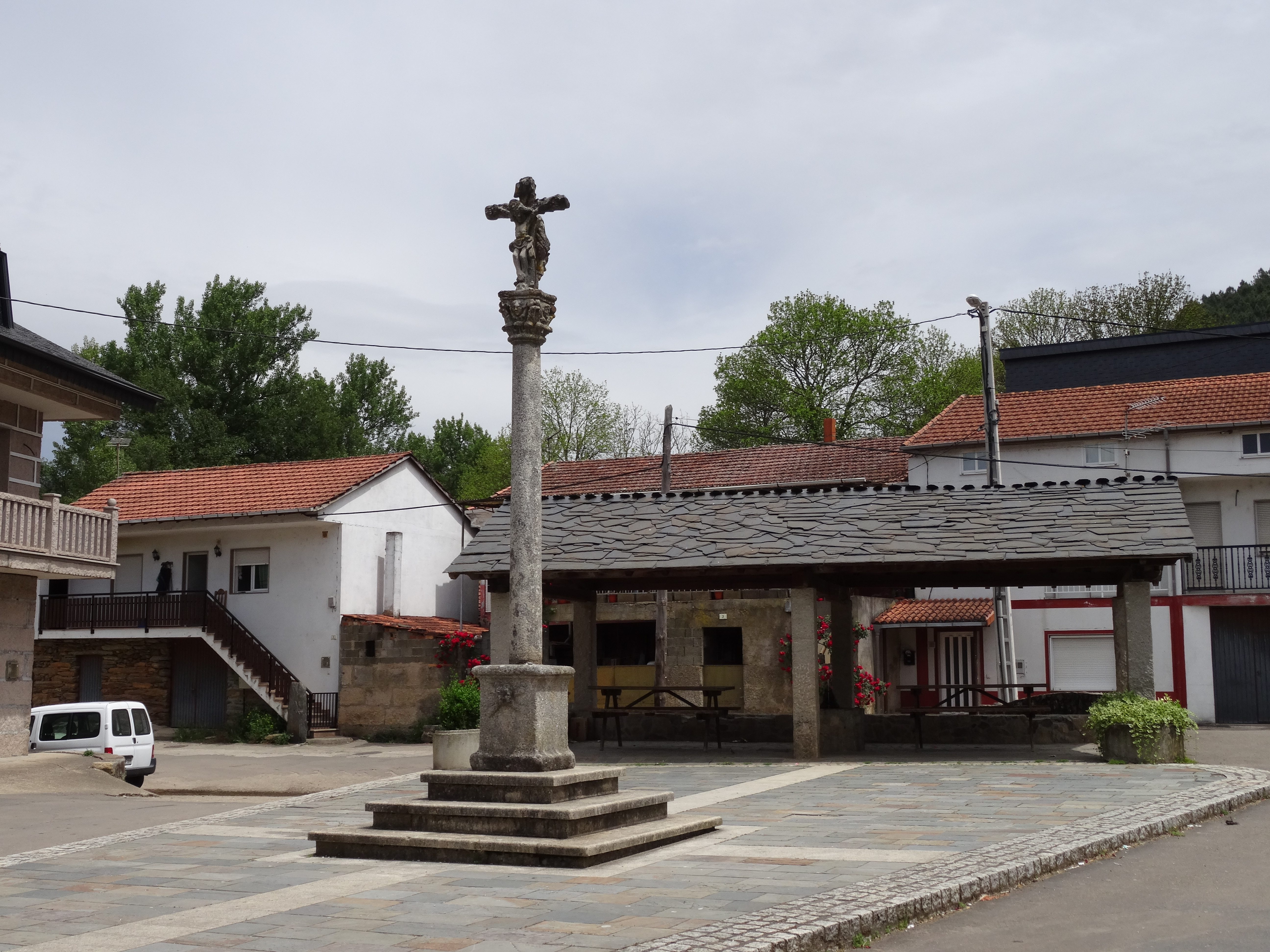 Ver título.